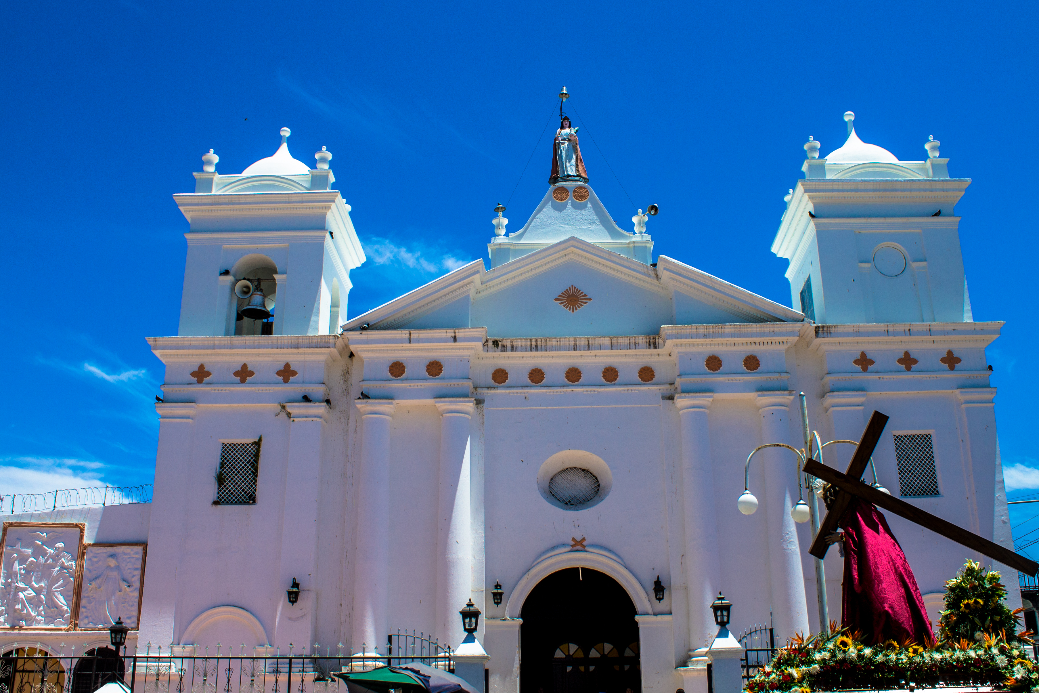 Iglesia Santa Barbara en Sensuntepeque, Cabañas